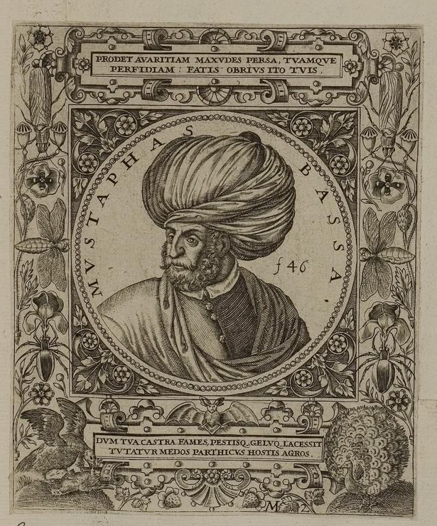 Grafik aus dem Klebeband Nr. 1 der Fürstlich Waldeckschen Hofbibliothek Arolsen Illustration aus: Georg Greblinger: Wahre Abbildungen der Türckischen Kayser vnd Persischen Fürsten / so wol auch anderer Helden und Heldinnen von dem Osman / biß auf den andern Mahomet. Johann Ammon, Frankfurt 1648 Motiv: "Mustafa Bassa" (Lala Mustafa Paşa)